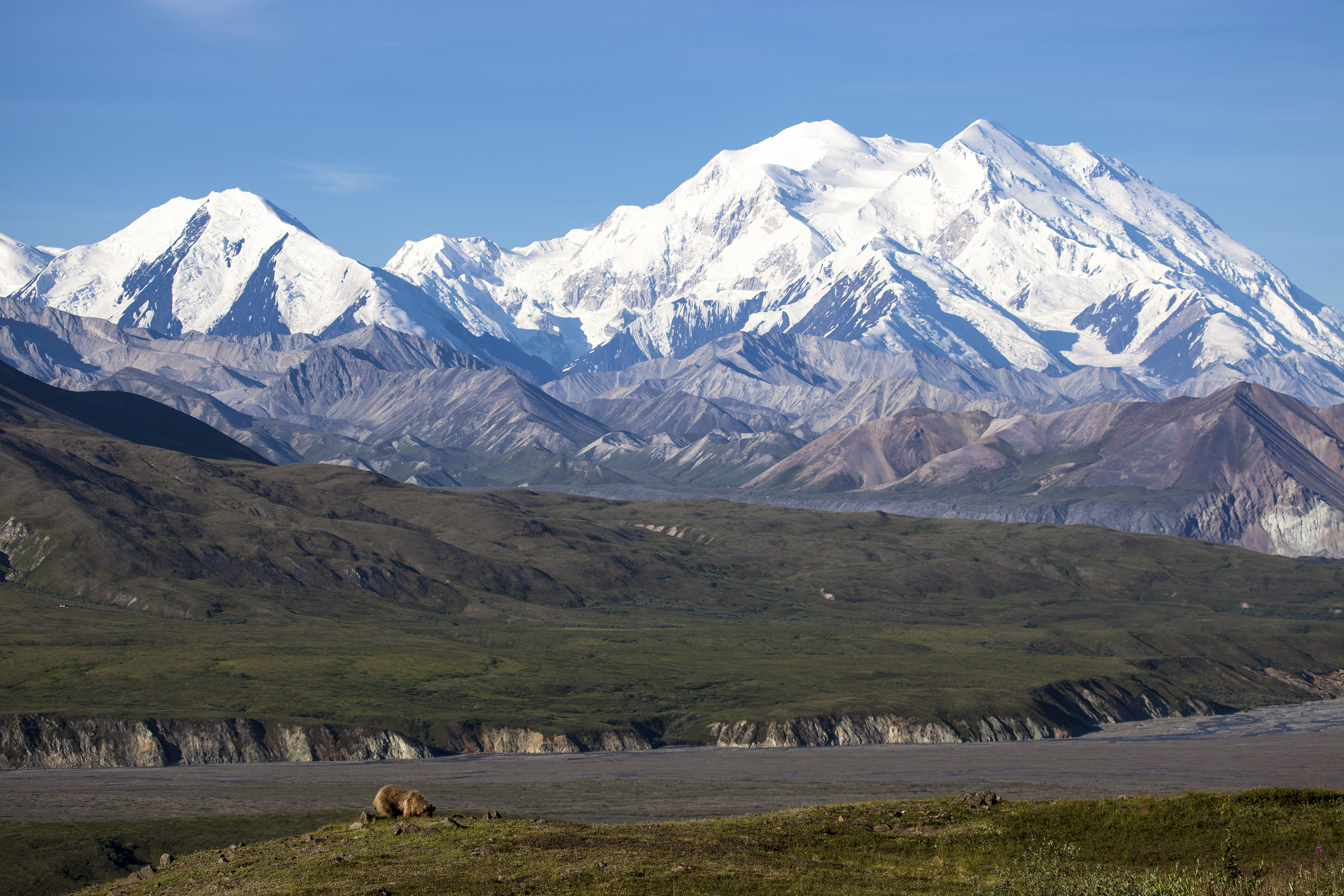 NPS Photo / Daniel A. Leifheit